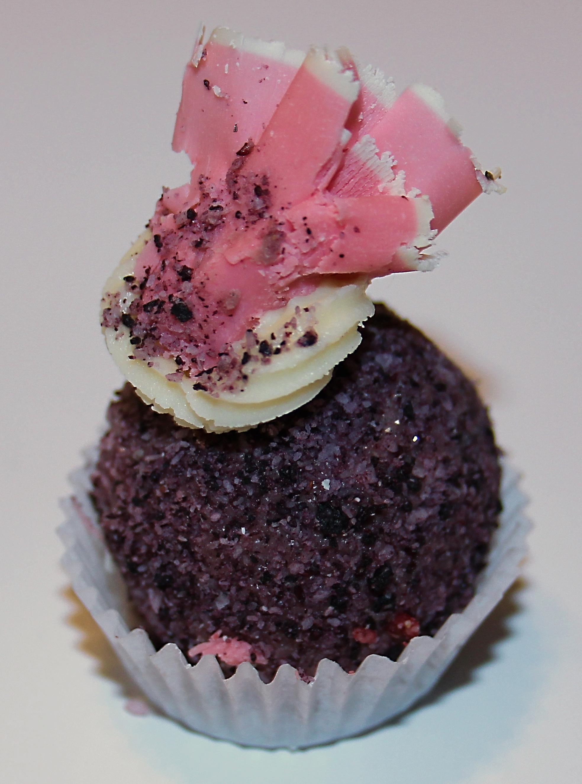 Handgemachte Praline des Ladens Sama Sama am Münchener Viktualienamrkt